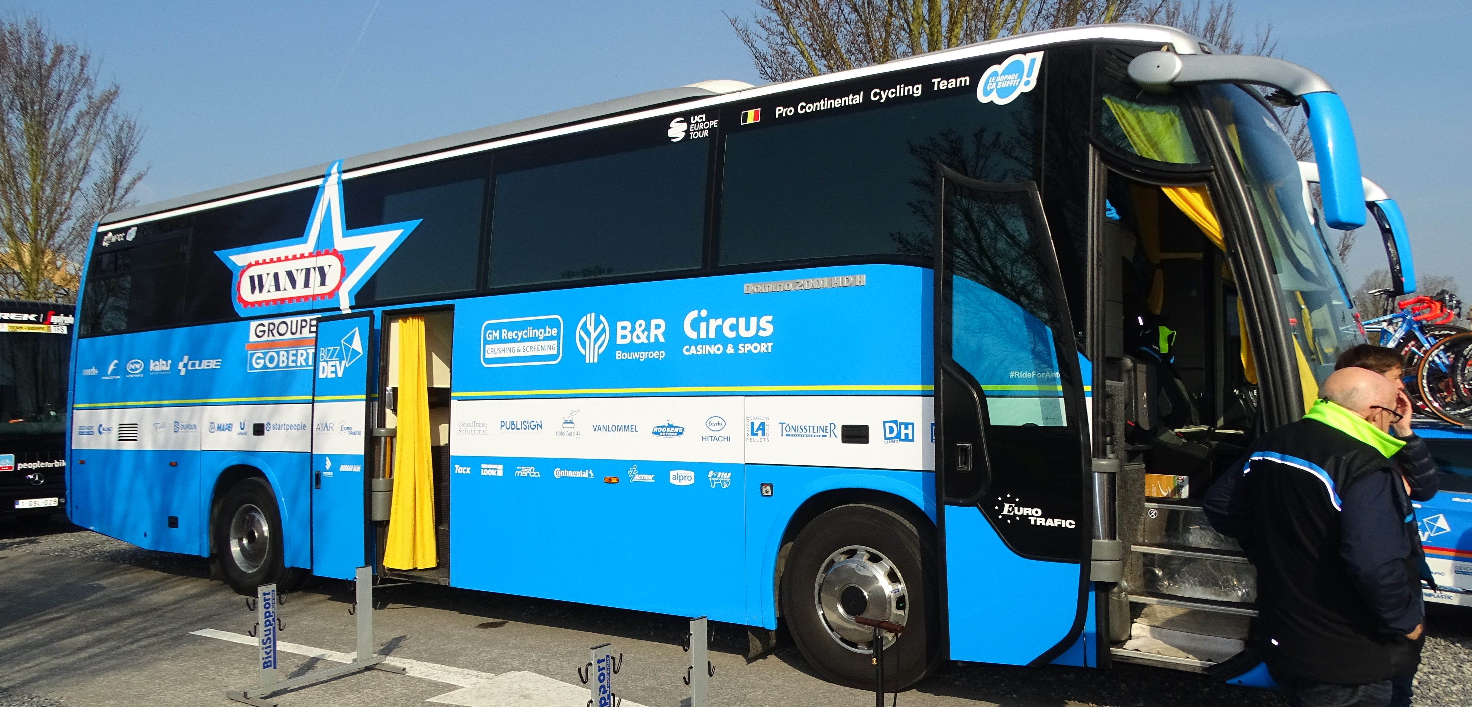 Reportage réalisé le mardi 28 mars à l'occasion de du départ de la première étape des Trois jours de La Panne 2017 à Adinkerque (La Panne), Belgique.